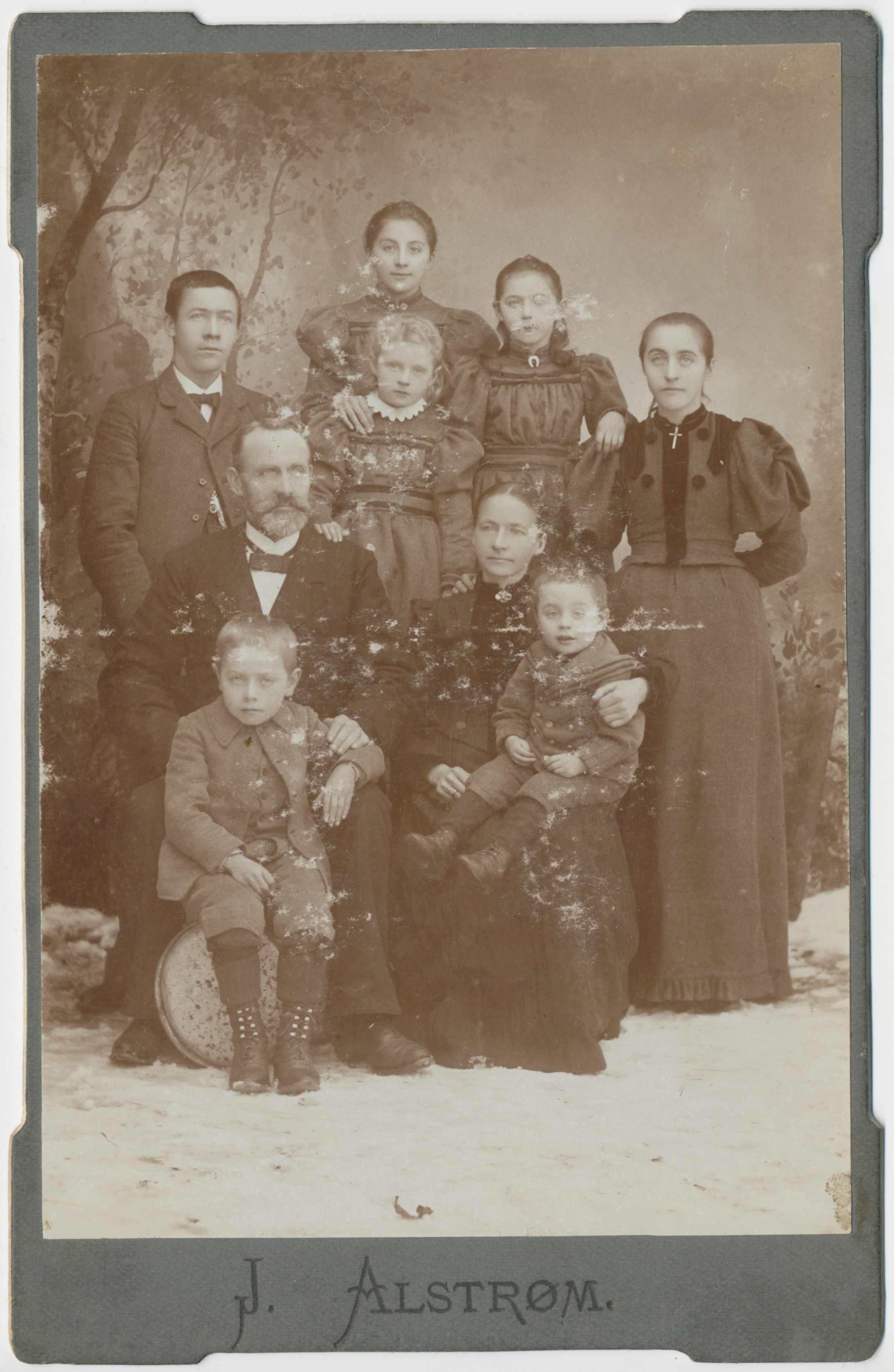 Sittende f.v. Arnt A. Solem (f. 1845) med sønnen Einar Solem (f. 1890) foran, Ane Martha (Lund) Solem (f. 1845) med sønnen Arne Solem (f. 1895) på fanget. Stående fra venstre: Arnfinn Solem (f. 1884), Ellen Marta Solem (f. 1892), Else Tora Solem (f. 1886; bakerst), Marit Solem (f. 1888) og Inger Anna Solem (f. 1881). Bildet er tatt på slutten av 1890-tallet. Se Frolslekten Gran I (s. 500-506) og Busetnad og folkeliv i Soknedal I (s. 434-435). Ane Martha var fra Ryggatrøa (Lund) i Skogn, og var søster av Johannes Lund på Elvheim i Åsen. Fotograf / Photographer: J. Alstrøm Fotoeier / Photo owner: Åsen Museum og Historielag Digitalisering / Digitizing: Arne Langås Foto-ID / Photo ID: 001-0499 Har du utfyllende opplysninger? Legg gjerne igjen en kommentar nedenfor eller send e-post til . | Do you have additional information? Please leave a comment or send an e-mail to .